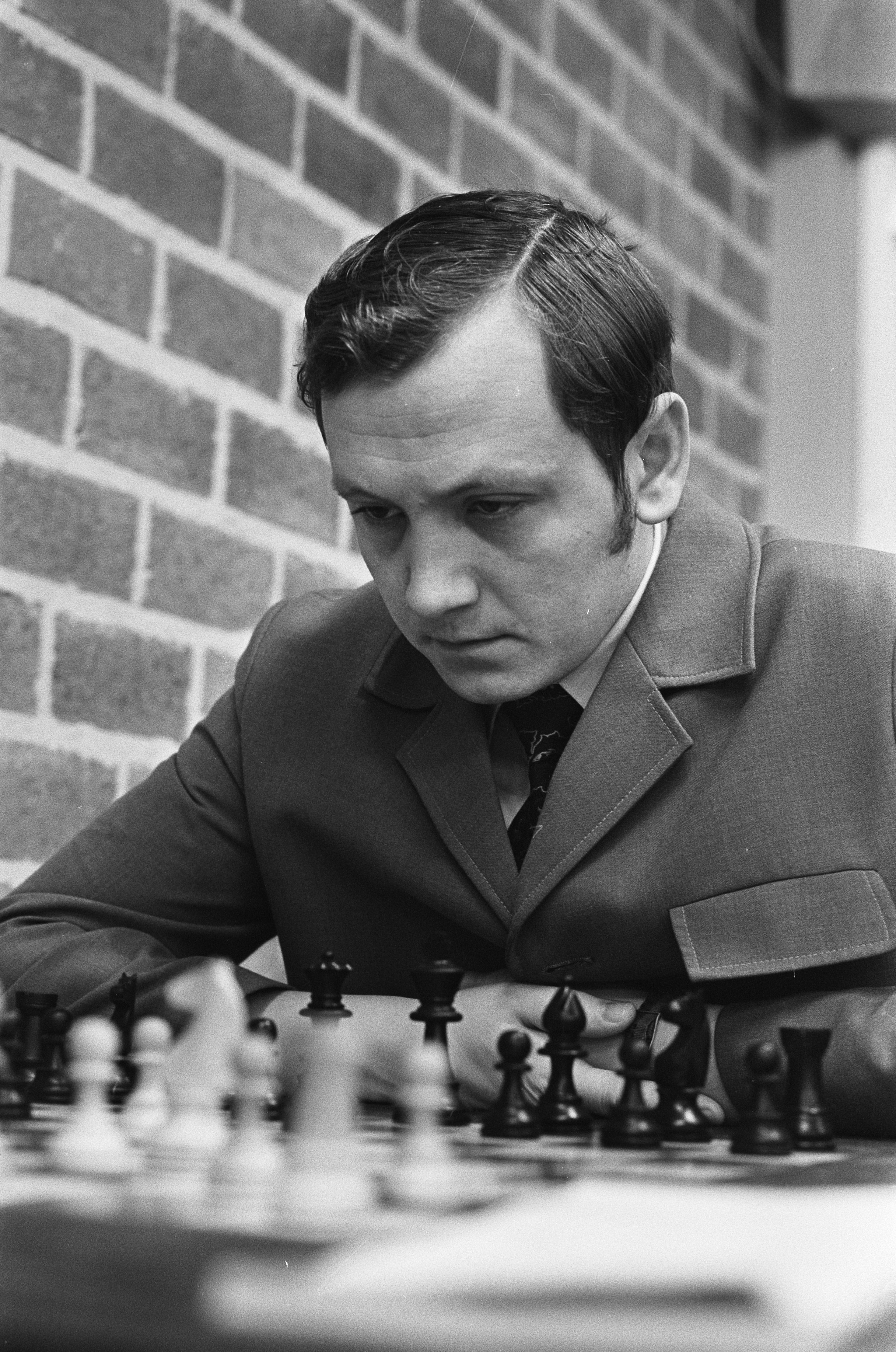 Collectie / Archief : Fotocollectie Anefo Reportage / Serie : [ onbekend ] Beschrijving : Hoogovenschaaktoernooi, de Rus Balasjof Datum : 25 januari 1973 Trefwoorden : schaken, toernooien Instellingsnaam : Hoogovenschaaktoernooi Fotograaf : Verhoeff, Bert / Anefo Auteursrechthebbende : Nationaal Archief Materiaalsoort : Negatief (zwart/wit) Nummer archiefinventaris : bekijk toegang 2.24.01.05 Bestanddeelnummer : 926-1801